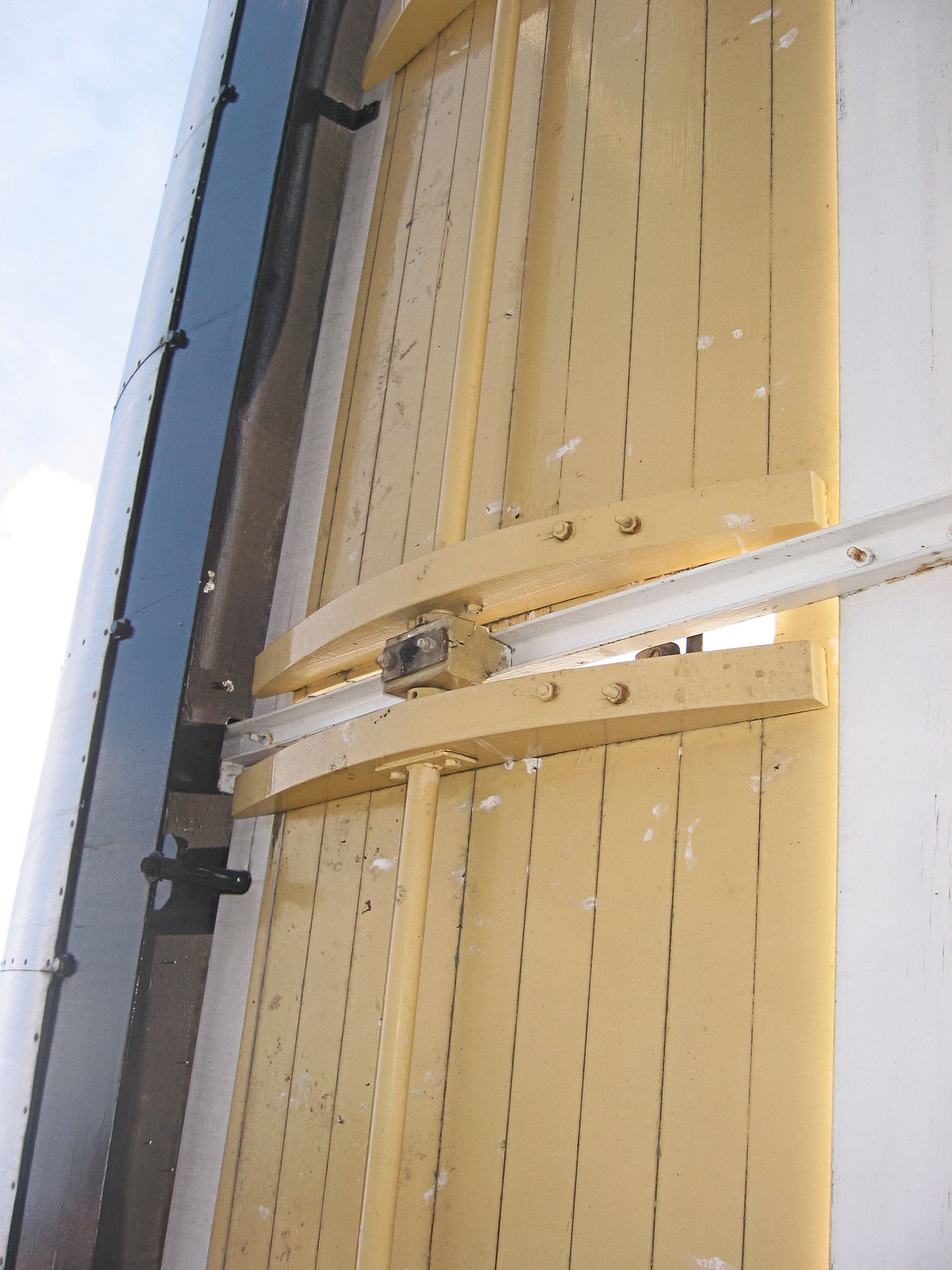 Ten Have-klep met klepas van de Venemansmolen, Winterswijk, the Netherlands